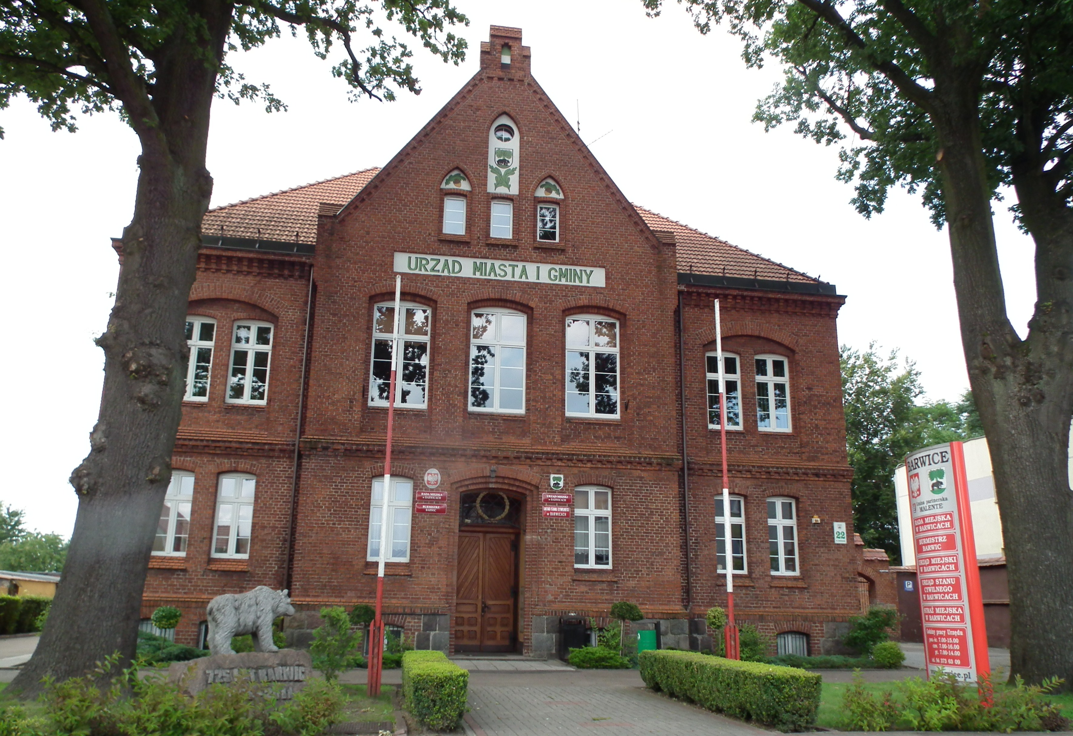 UMiG w Barwicach.